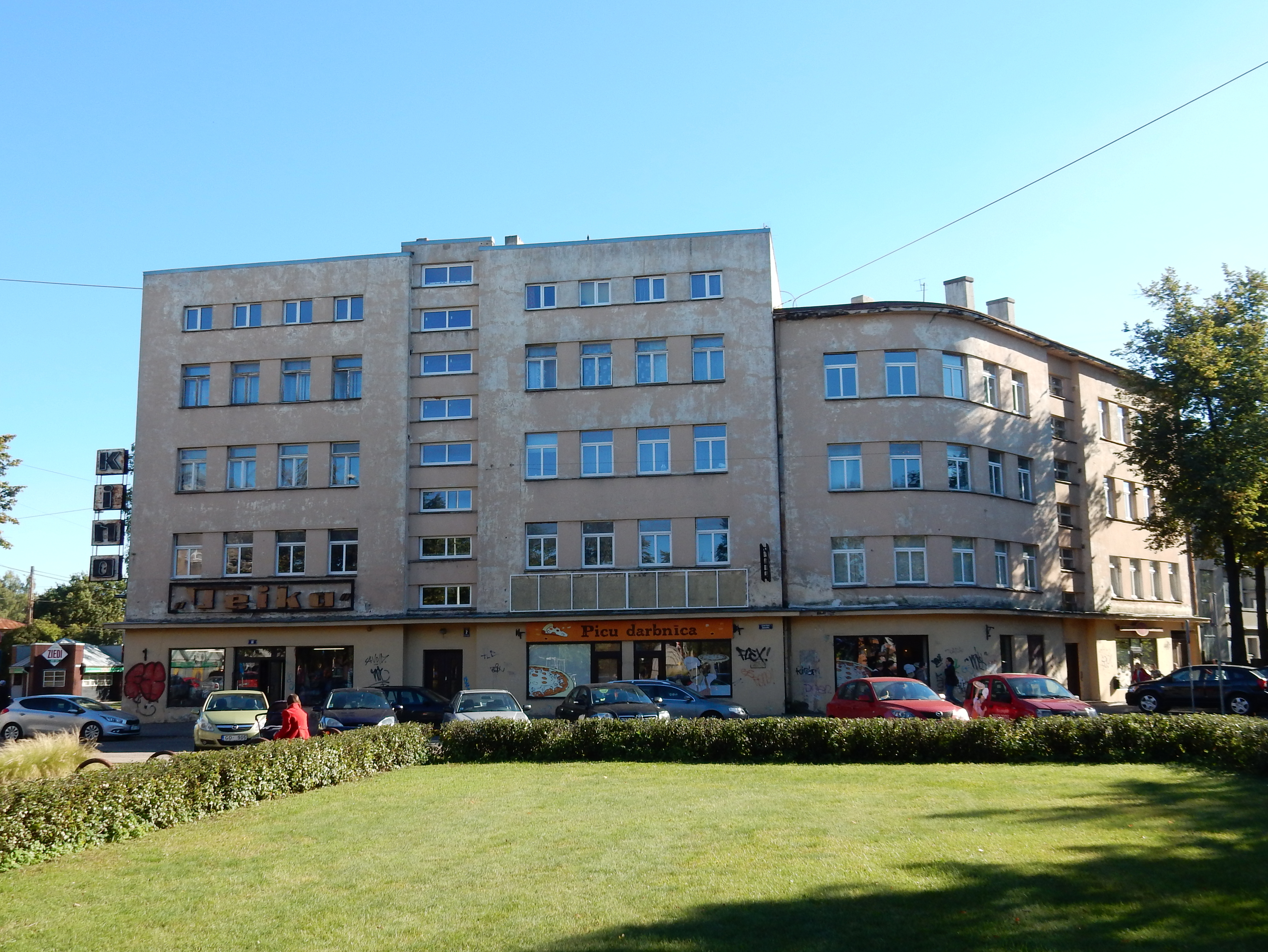 Īres nams ar kino, Rīga, Zemitāna laukums 2